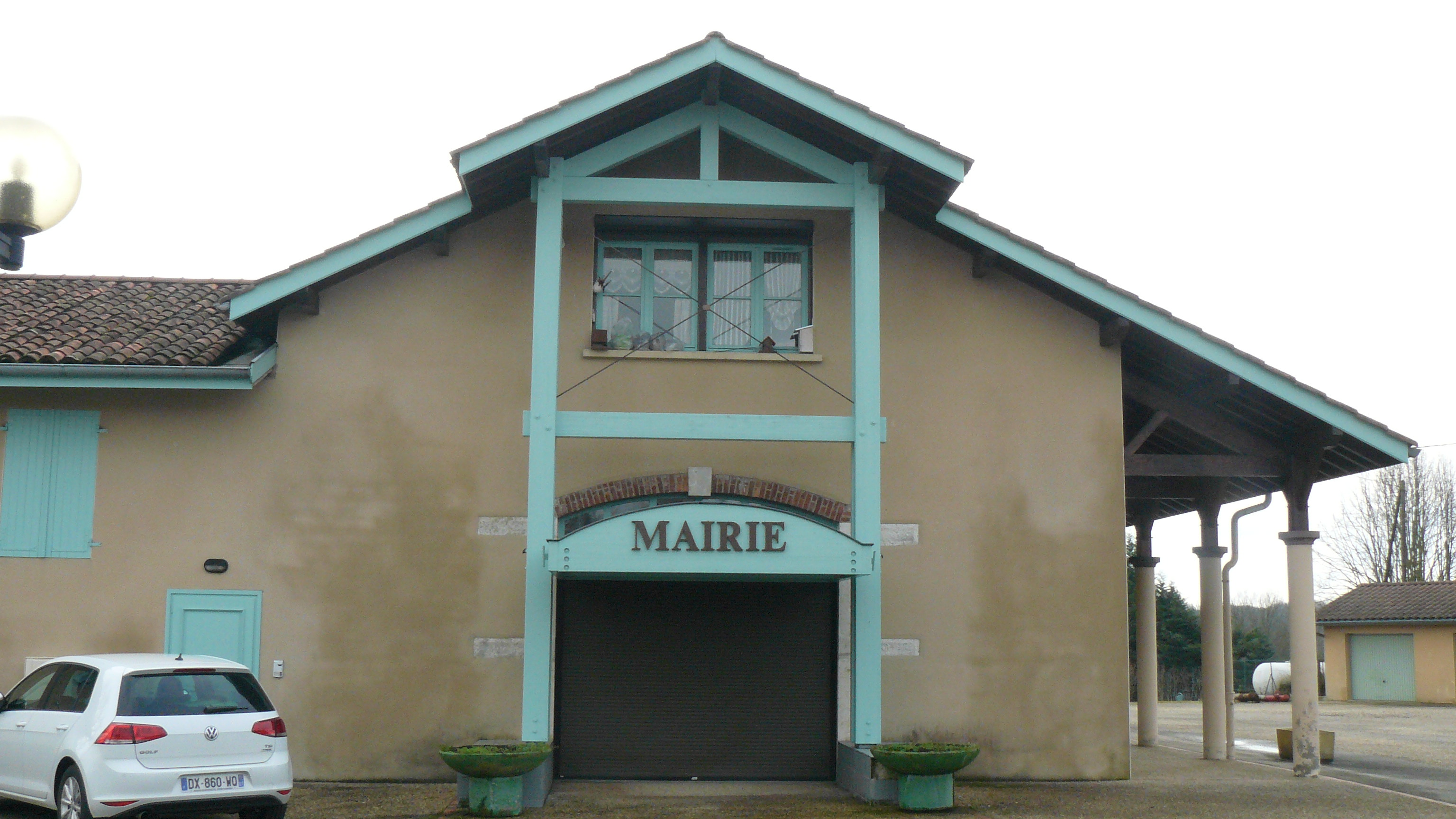 Façade de la mairie de La Tranclière.